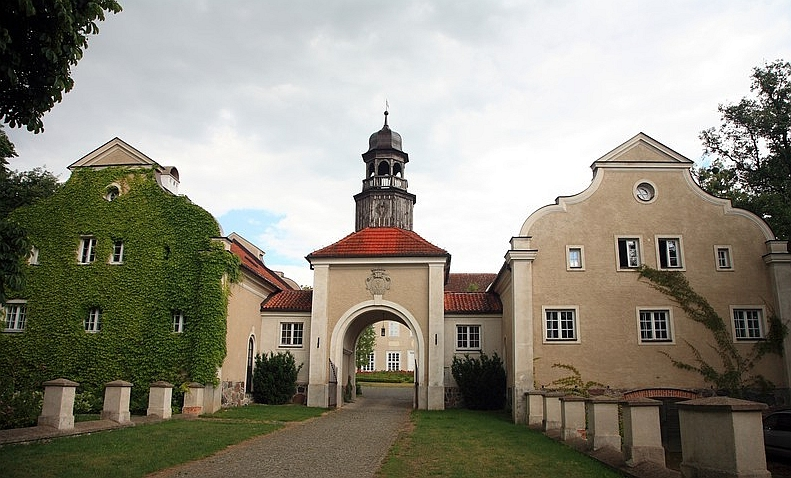 Galiny, woj. warmińsko-mazurskie, w powiat bartoszycki, gmina Bartoszyce